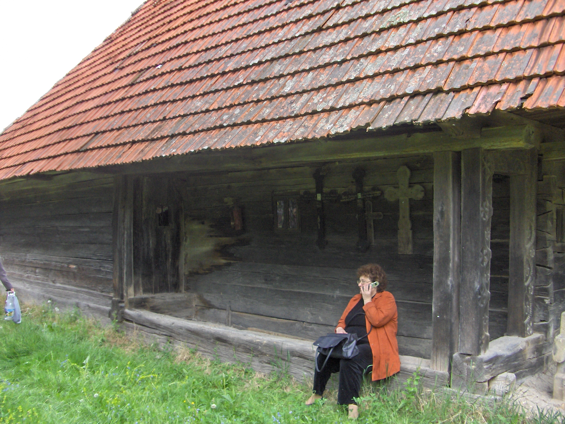 Biserica de lemn din Totoreni, judeţul Bihor. Perindele. Sărbătorirea paştilor morţilor 2008